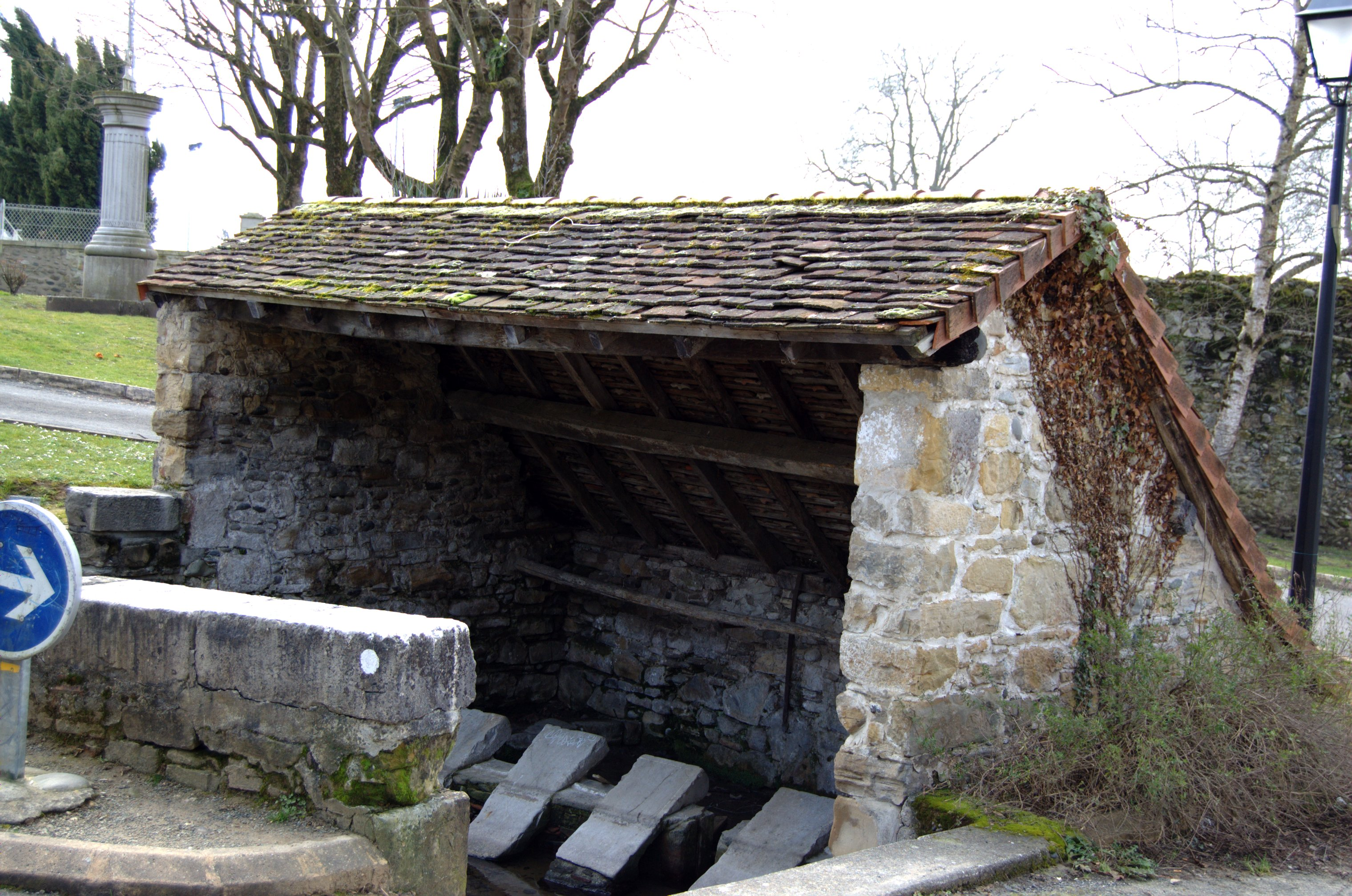 Lavoir d'Audaux, 64, France.